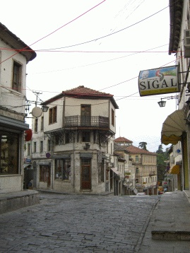 rue de la ville-musée de Gjirokastre